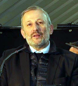 Le député-maire de Sarcelles Fançois Pupponi à Pierrefitte-sur-Seine le 12 février 2015.